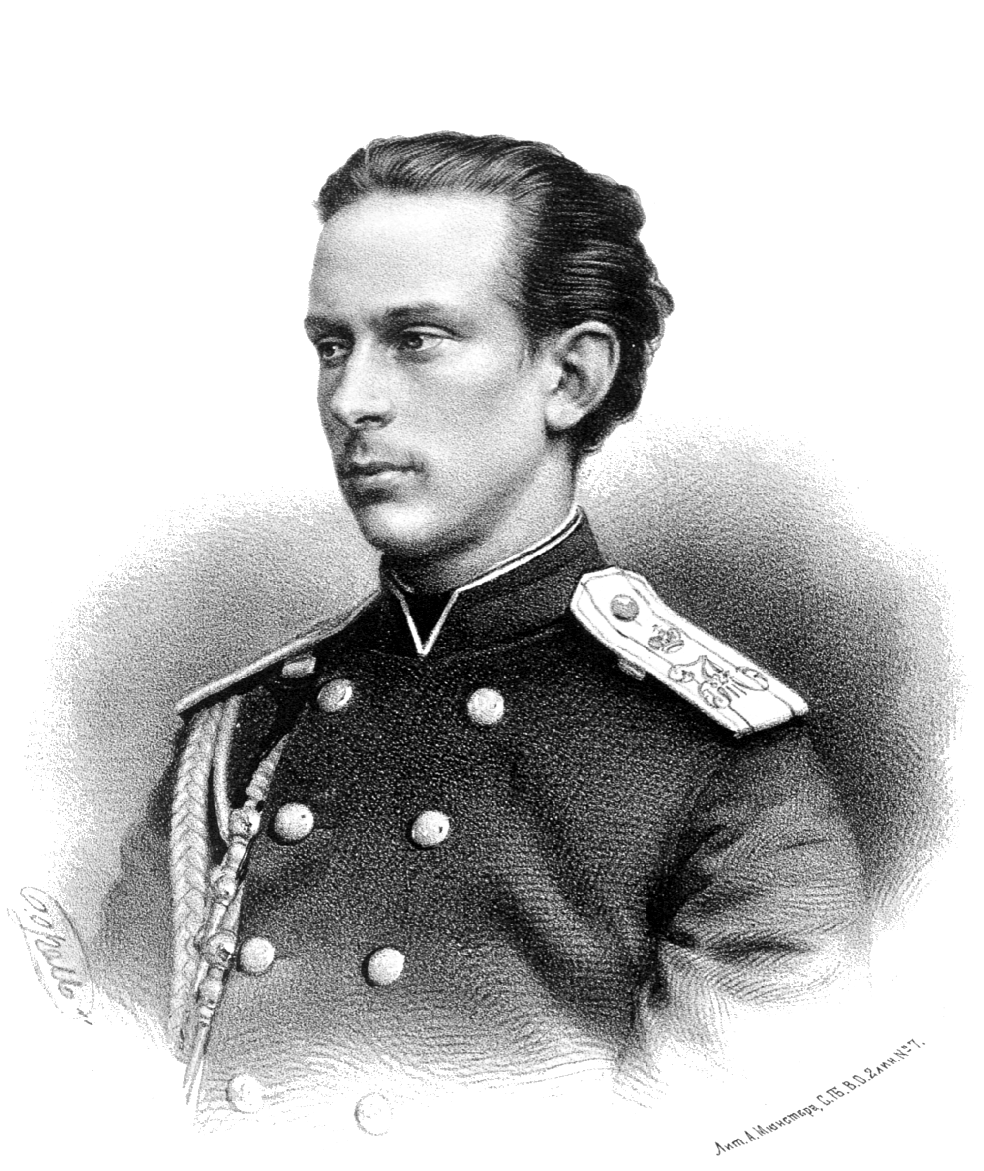 Портрет Князя Романовского, Герцога Николая Максимильяновича Лейхтенбергского. Президента Императорского СПб. Минералогического общества. 1867 год.